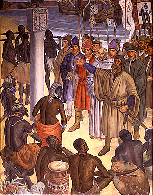 Painel, da Assembleia da República de Portugal, representando Diogo Cão, na foz do Zaire, depois de haver colocado o padrão da descoberta